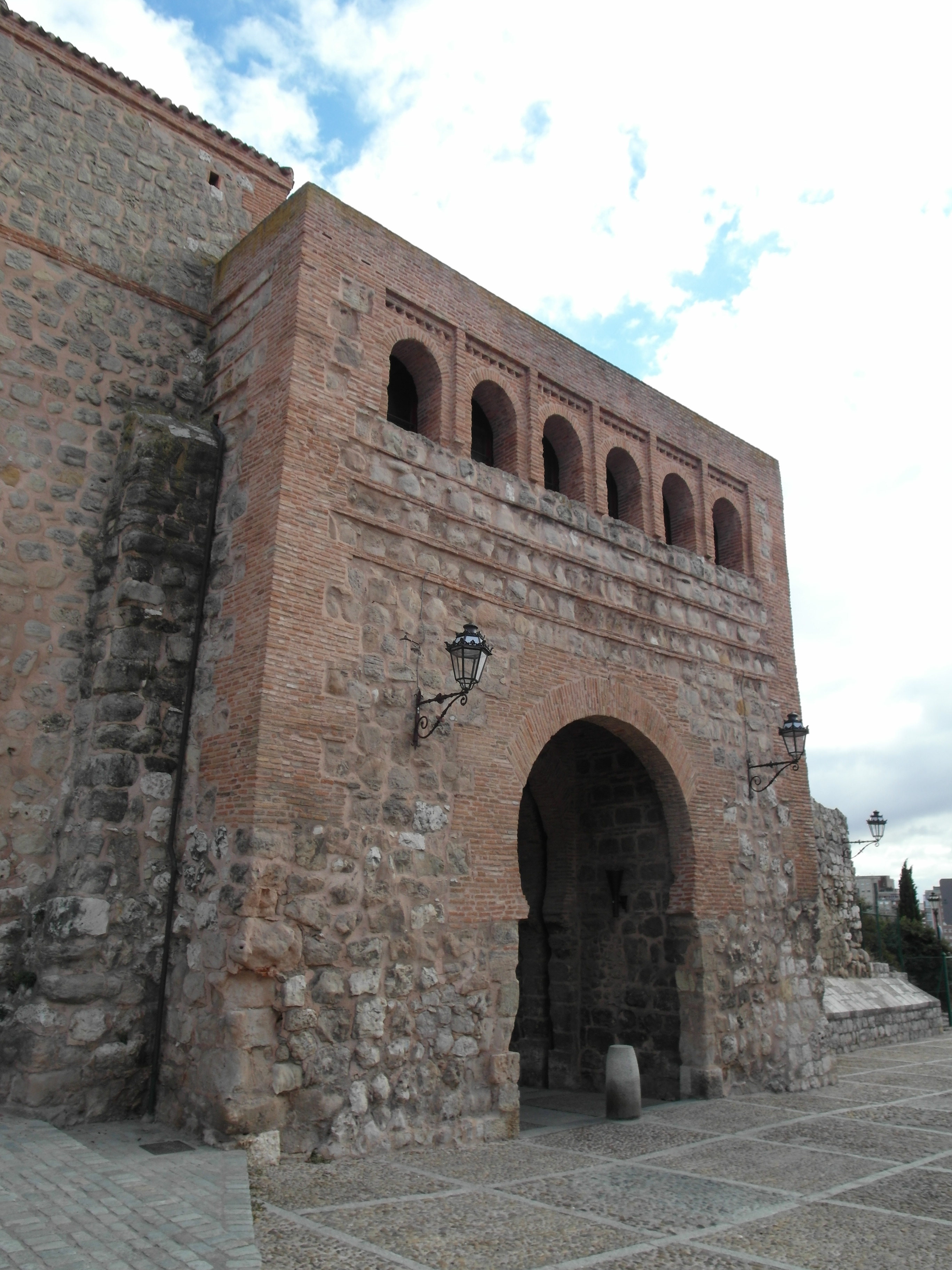 Arco de san Estaban, Burgos.